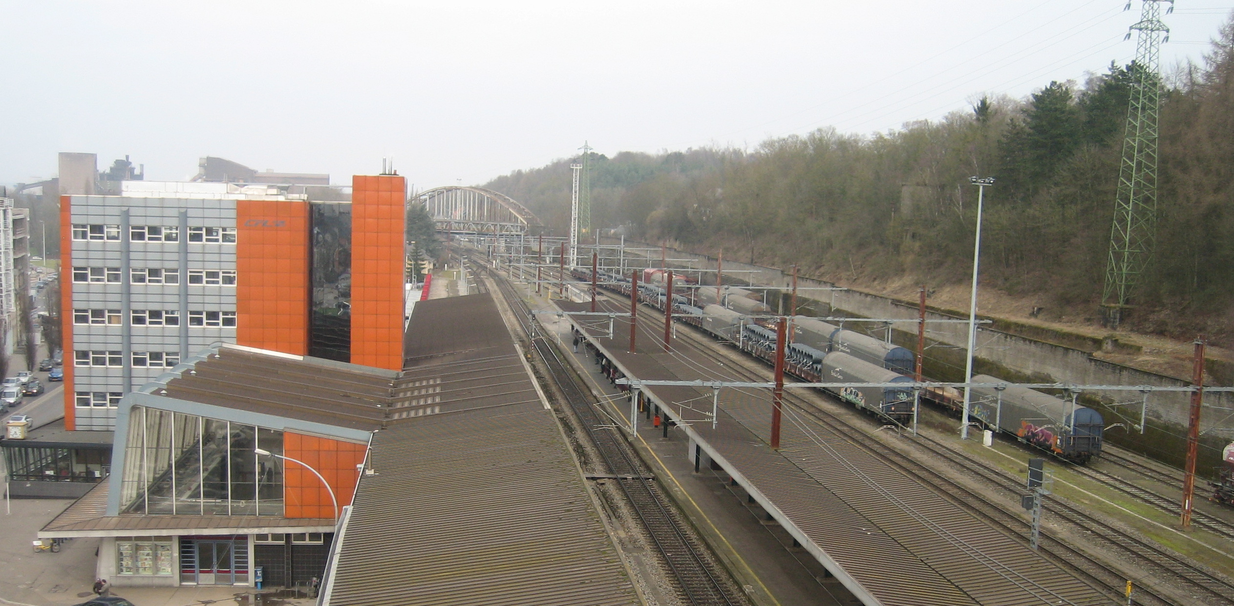 La gare d'Esch-sur-Alzette (Luxembourg) vue de la passerelle